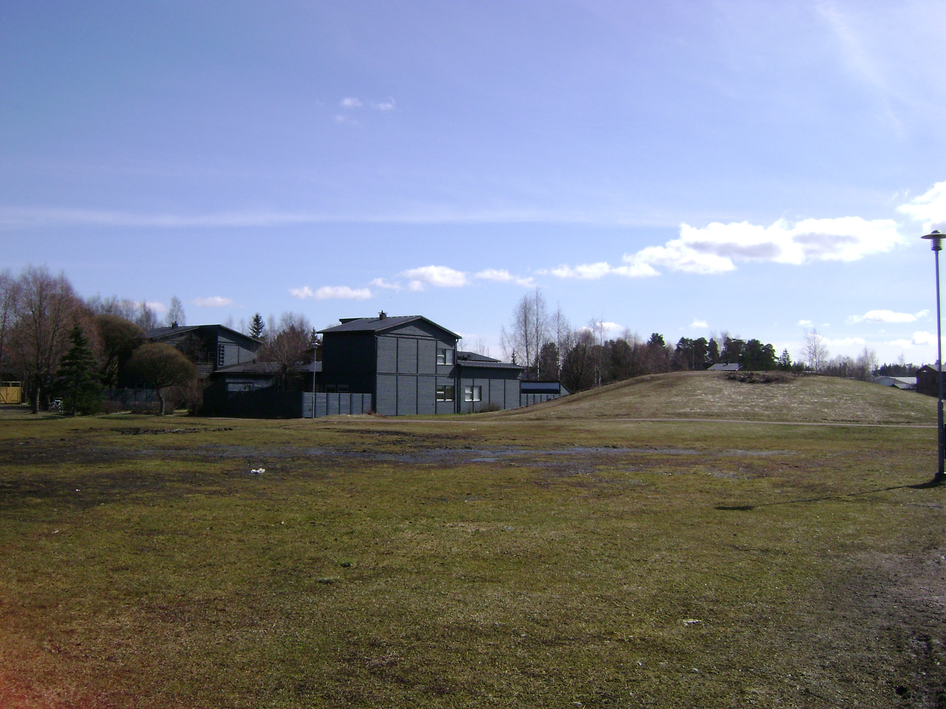 Järvenpään Tanhuniityn kaupunginosan keskusosaa.